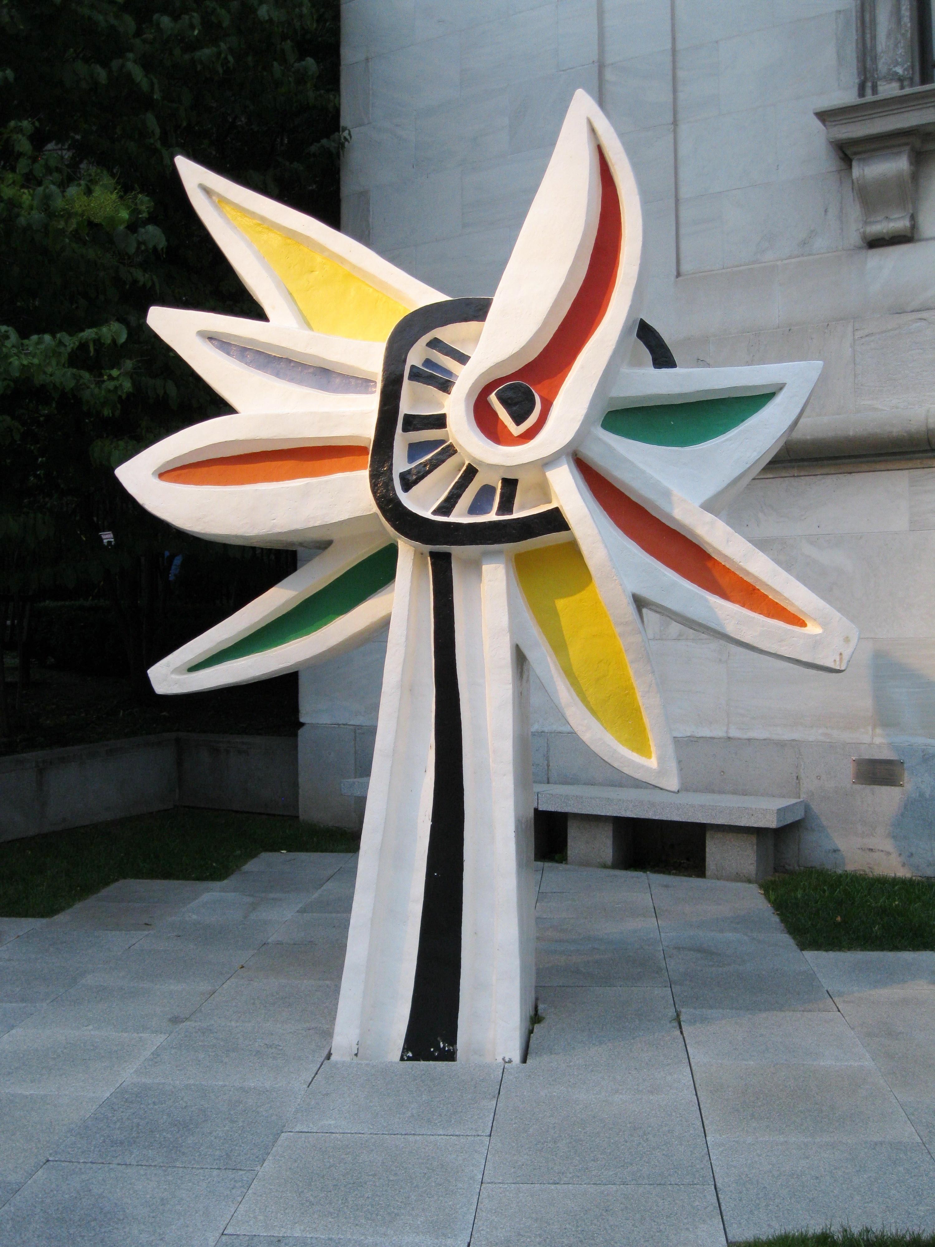 Grand tournesol (La Fleur polychrome) (1952) (fonte 2000), œuvre de de Fernand Léger, située devant le pavillon Michal et Renata Horstein du Musée des beaux-arts de Montréal, 1379, rue Sherbrooke Ouest (côté nord)